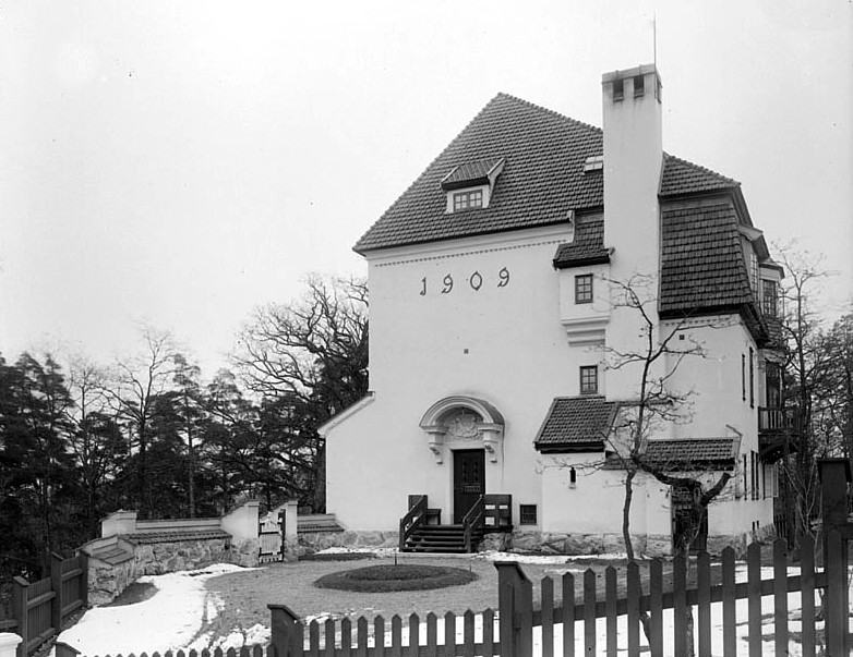 Överintendent Möllers villa Bo på Djurgården